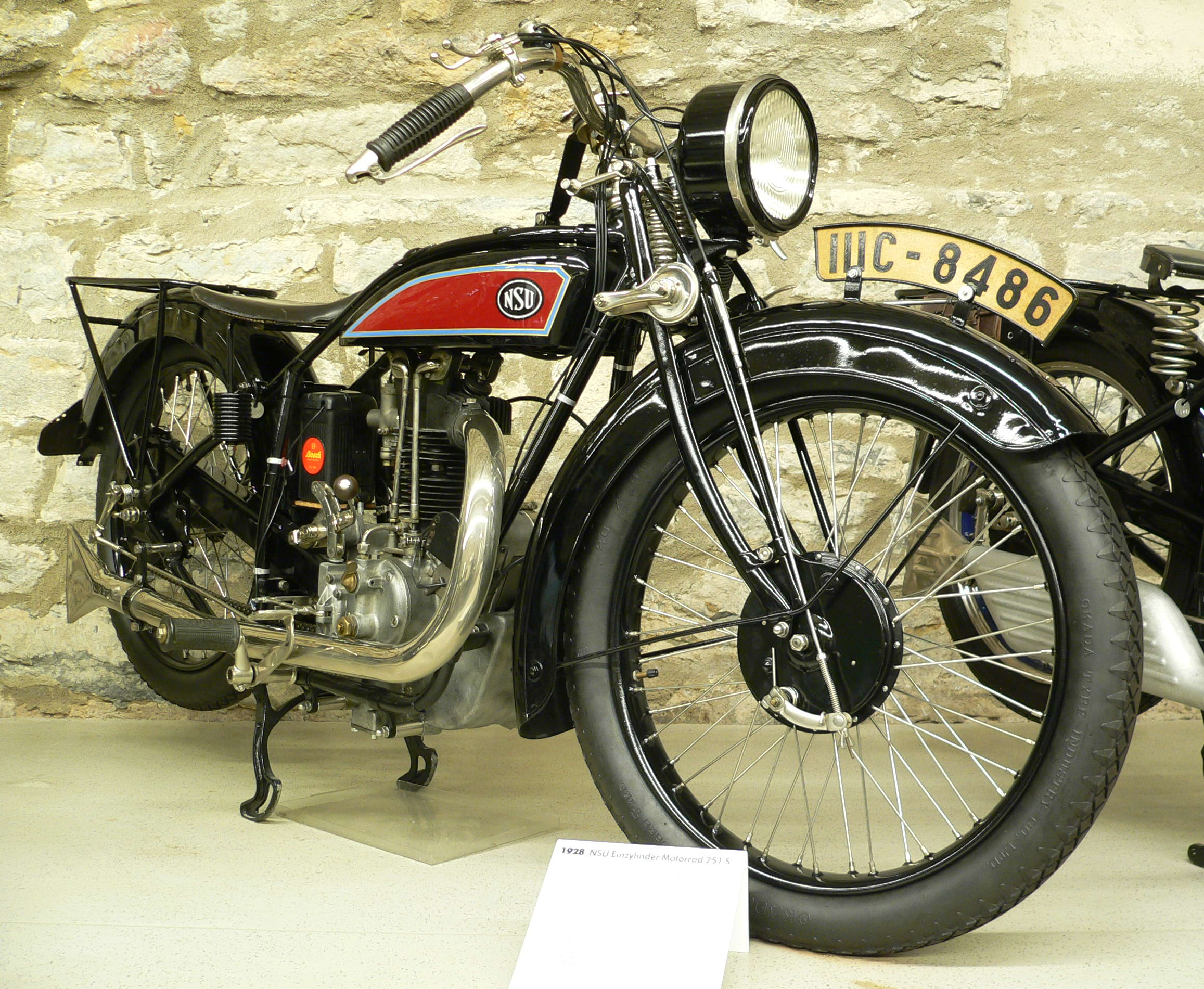 Motorbike "NSU 251 S" (1928) at the Deutsches Zweirad- und NSU-Museum